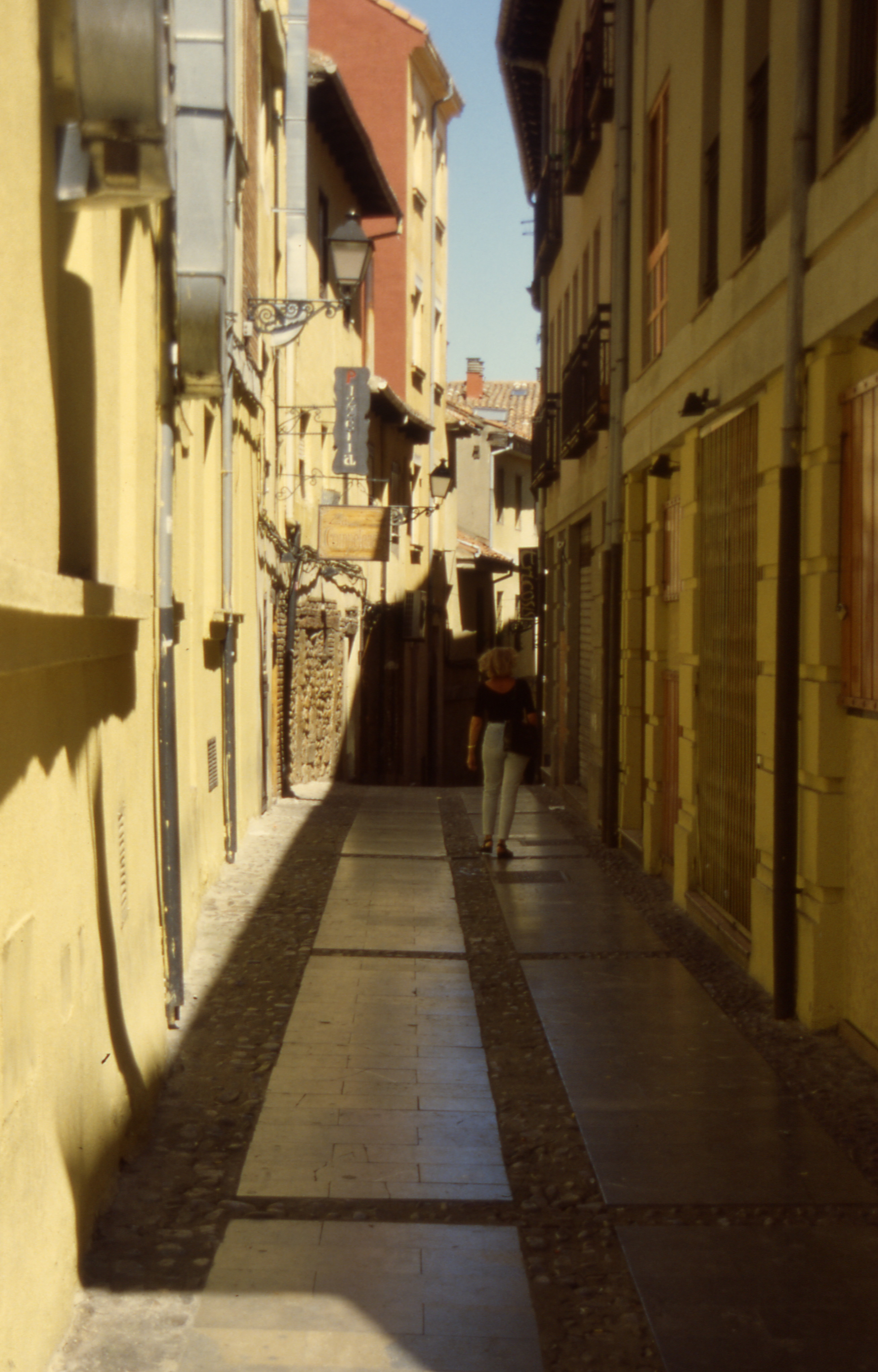 Leon Ansicht 1